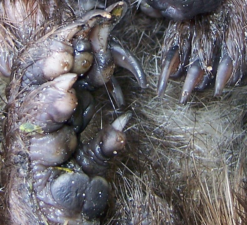 Stacheligel (Erinaceus europaeus) in Bremen, fast ganz eingerollt